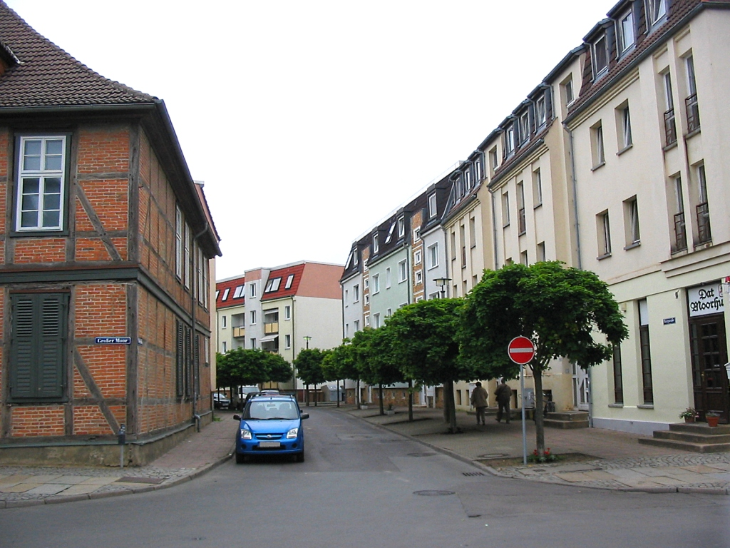 Drei Bauetappen in der Schweriner Innenstadt. Blick in die Burgstraße. Das Fachwerhaus links ist Großer Moor 38, ein denkmalgeschütztes Wohnhaus.